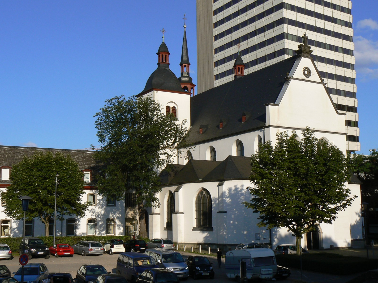 Kirche Alt St. Heribert in Köln-Deutz.